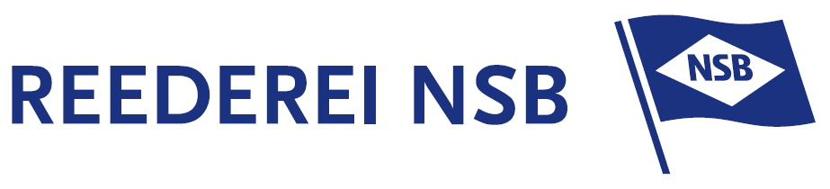 Logo NSB Niederelbe Schiffahrtsgesellschaft